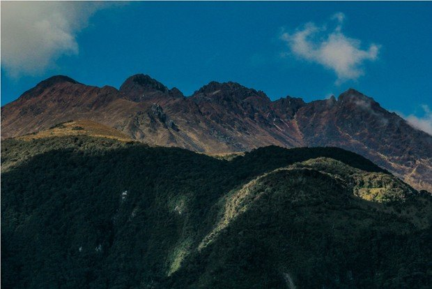 Esta fotografía fue tomada en el municipio colombiano con código 19760.